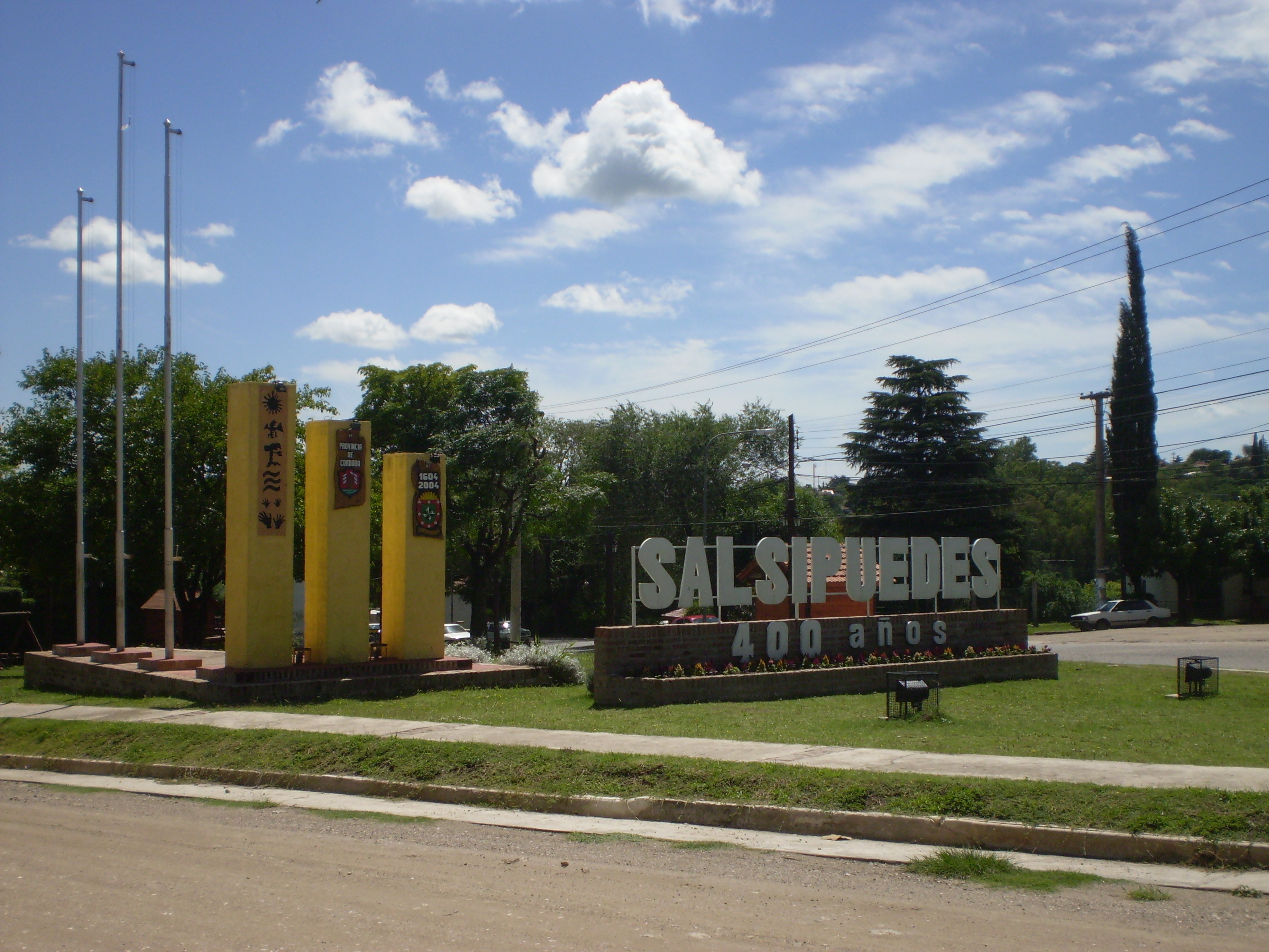 Salsipuedes, monumento en conmemoración a los 400 años de su fundación en 2004. Córdoba, Argentina.